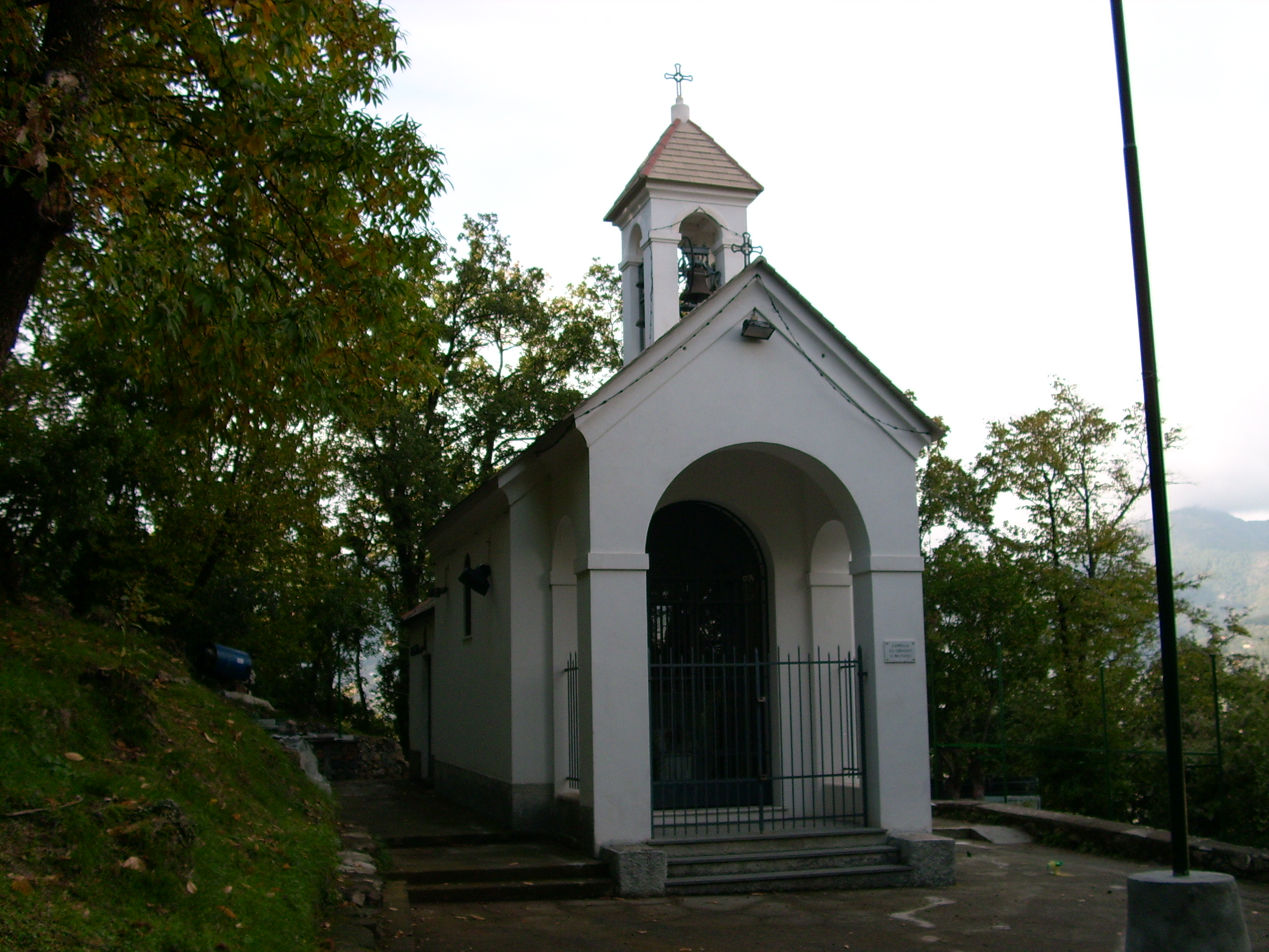 Chiesetta dei Santi Gervasio e Protasio di Rapallo, Liguria, Italia